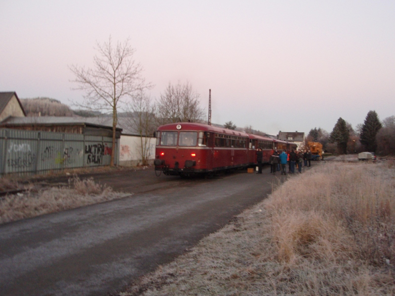 Auf dem Foto ist eine vierteilige Schienenbusgarnitur in Sundern (Sauerland) zu sehen. Die Sonderfahrt zum Marburger Weihnachtsmarkt wurde vom VCD organisiert.